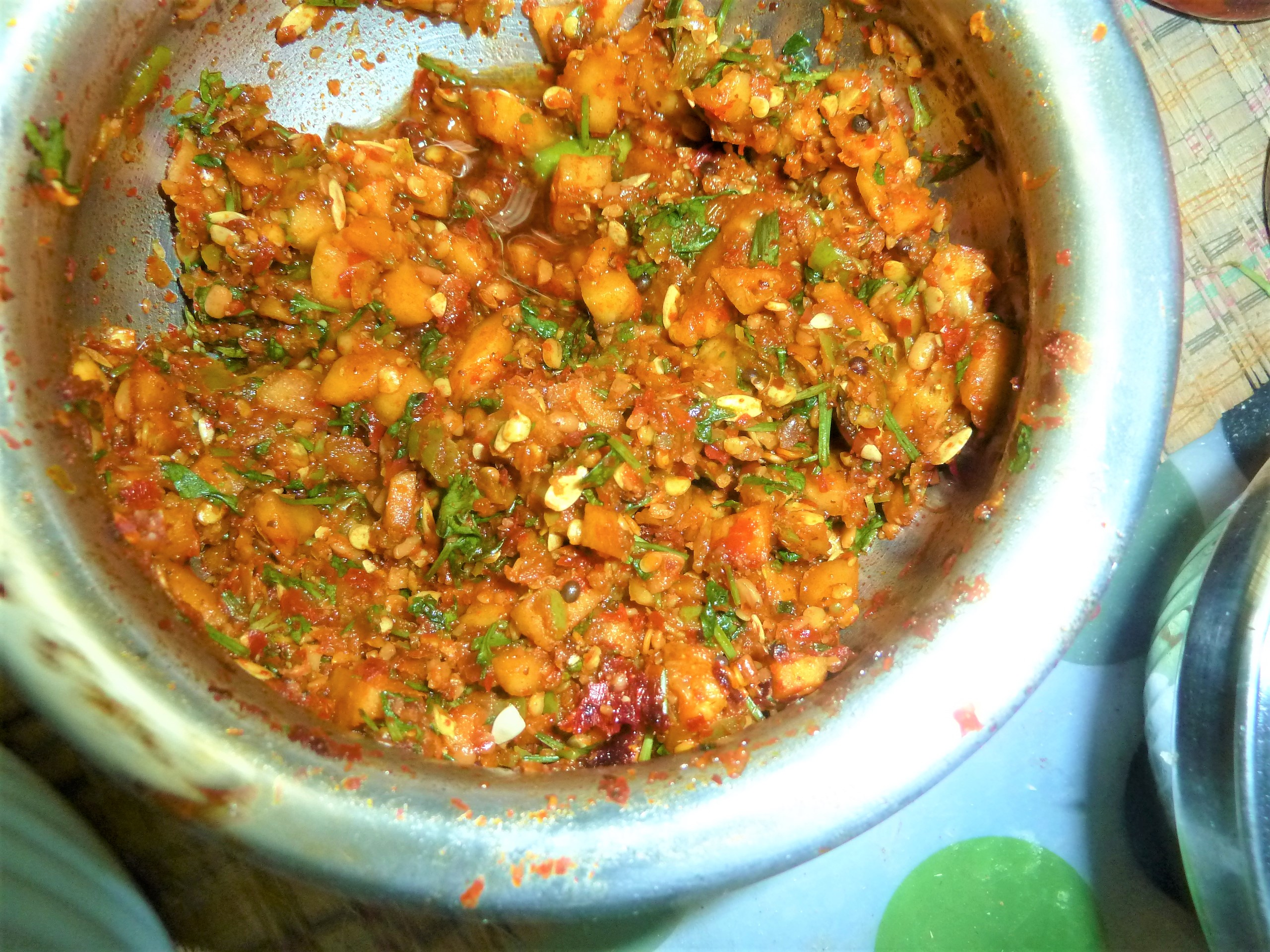 దోసకాయ ఎండు కారం పచ్చడి